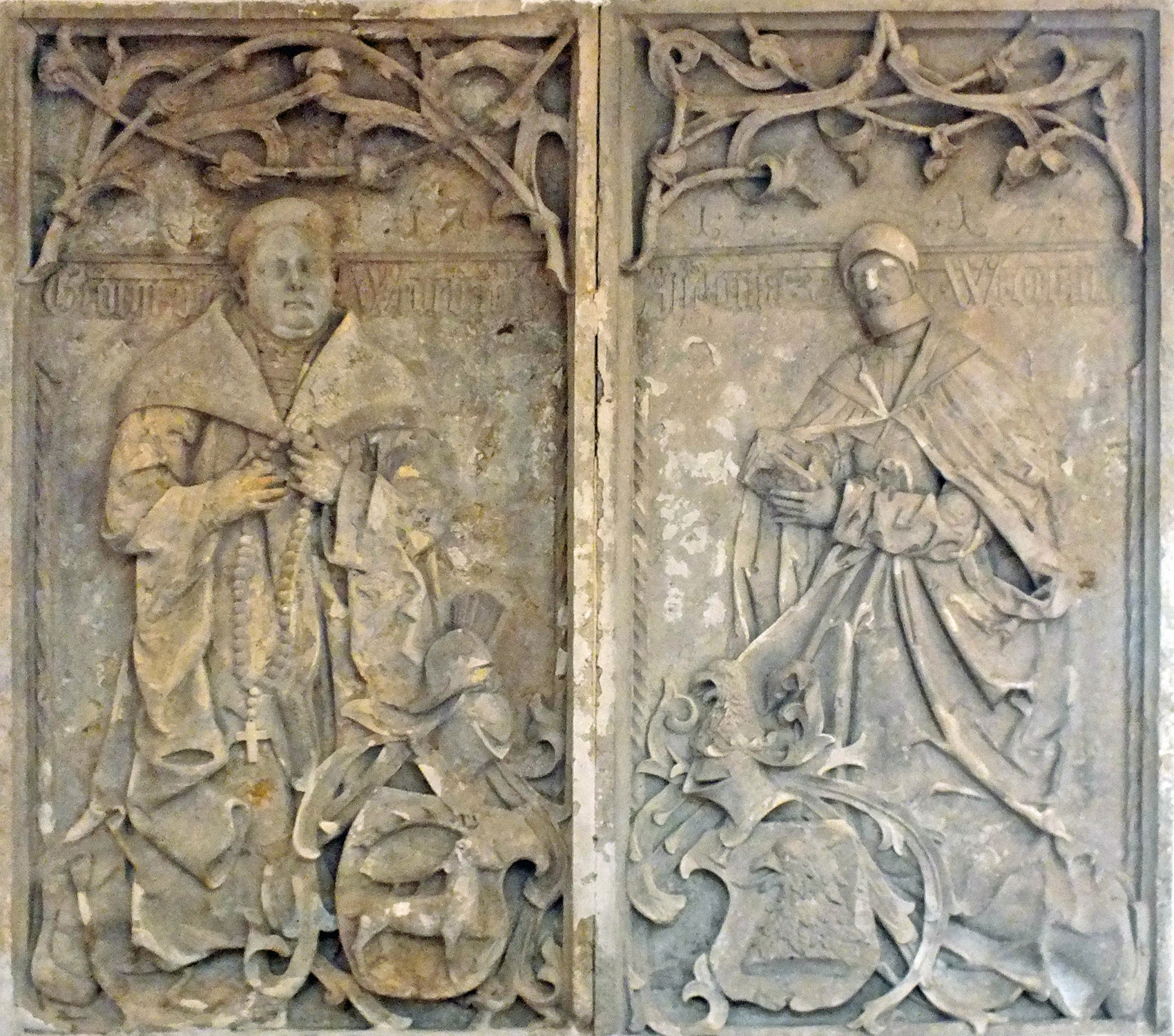 Epitaph Apollonias und Georgs von Wiedebach in der Thomaskirche Leipzig